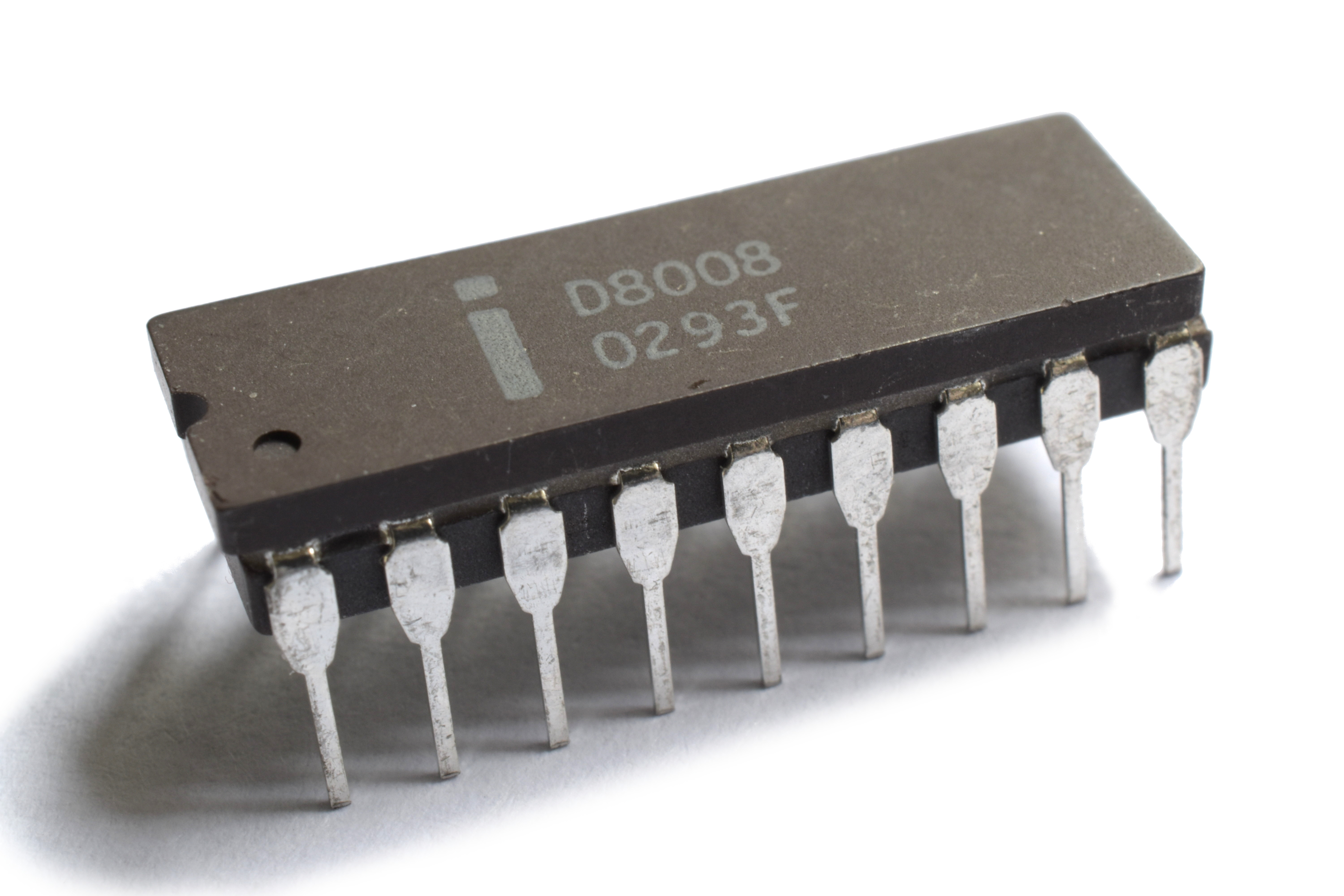 Procesoro Intel D8008.